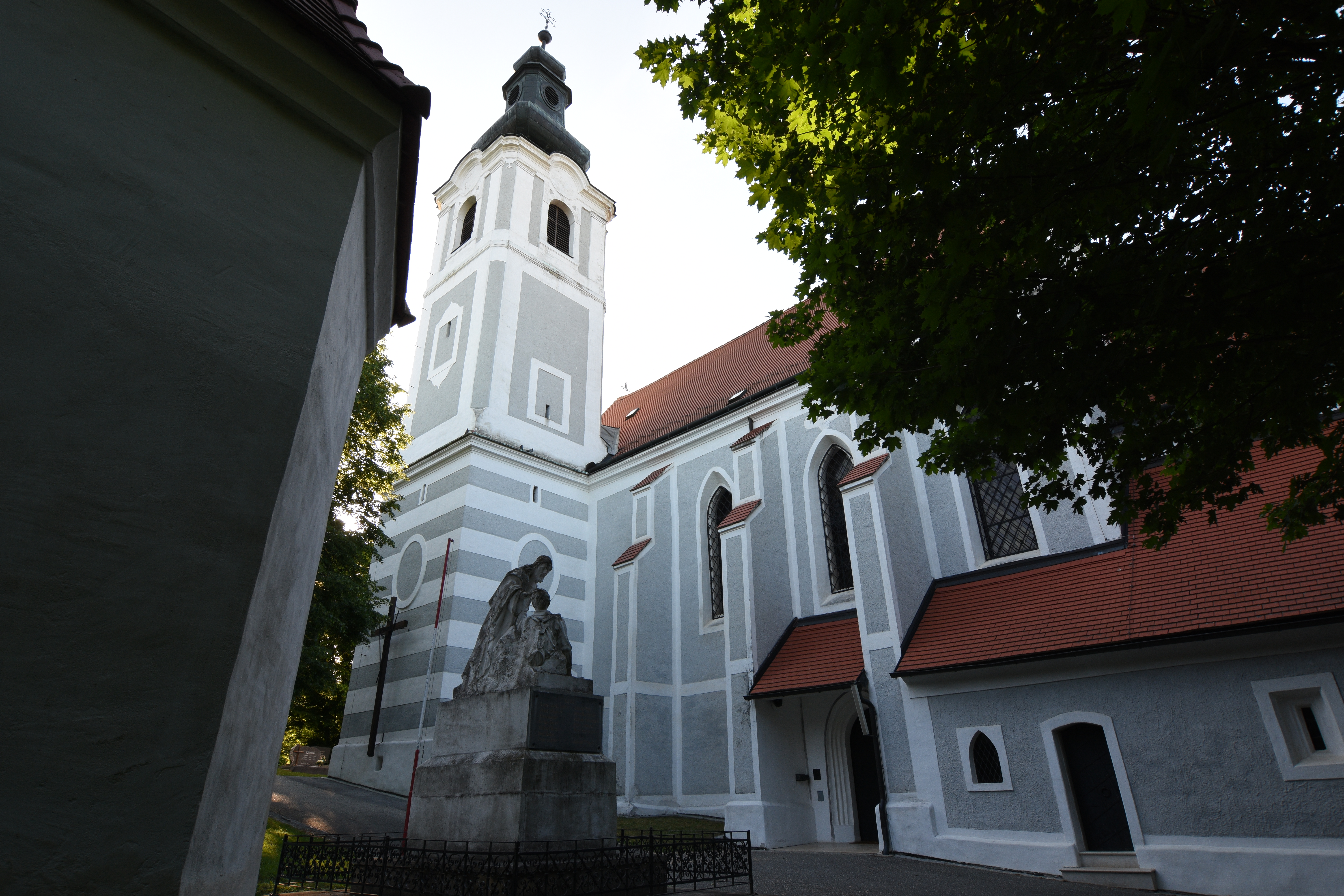 Pfarrkirche Gaas